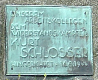 Kurt Schlosser Gedenkstein vor den Deutschen Werkstätten in Dresden Hellerau (Original text: Kurt Schlosser Gedenkstein)